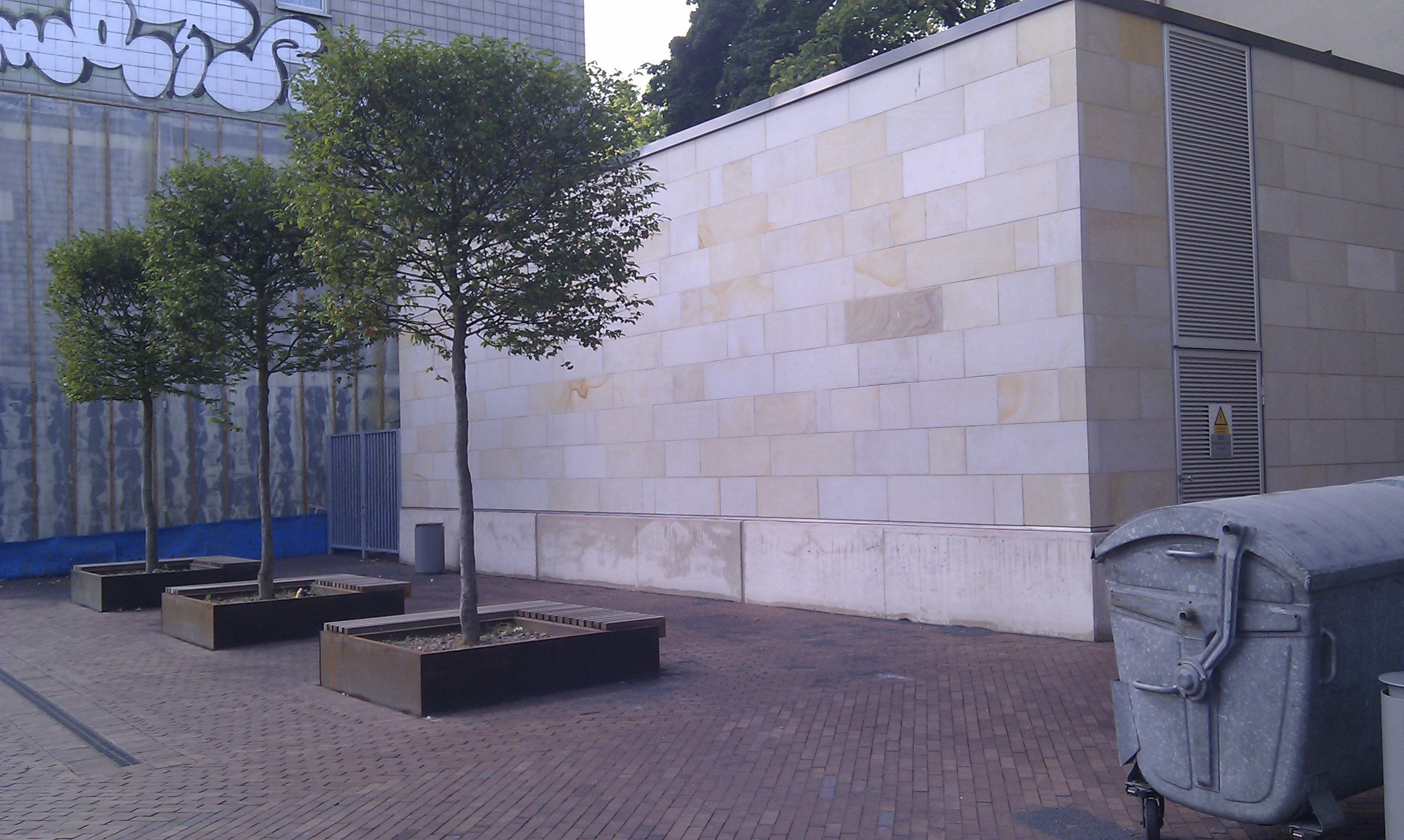 Die neue Front der Barmer Ruhmeshalle von der B7 aus gesehen.